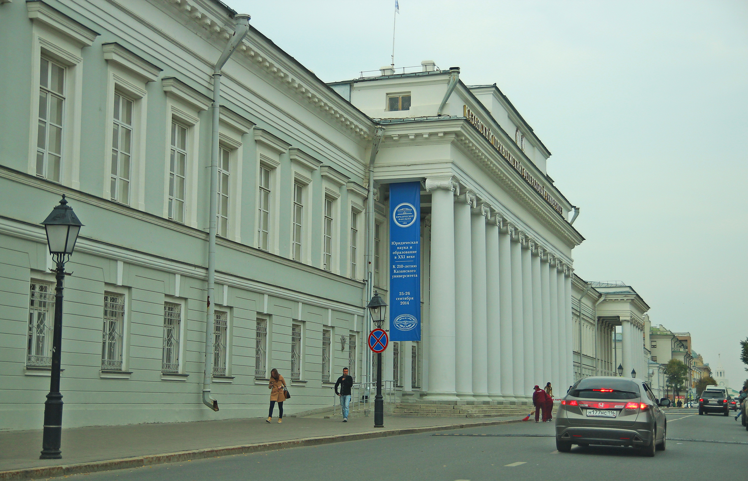 Ансамбль Казанского Государственного университета им. В. И. Ульянова-Ленина (Республика Татарстан, Казань, Кремлевская улица, 18 (бывш. улица Ленина))